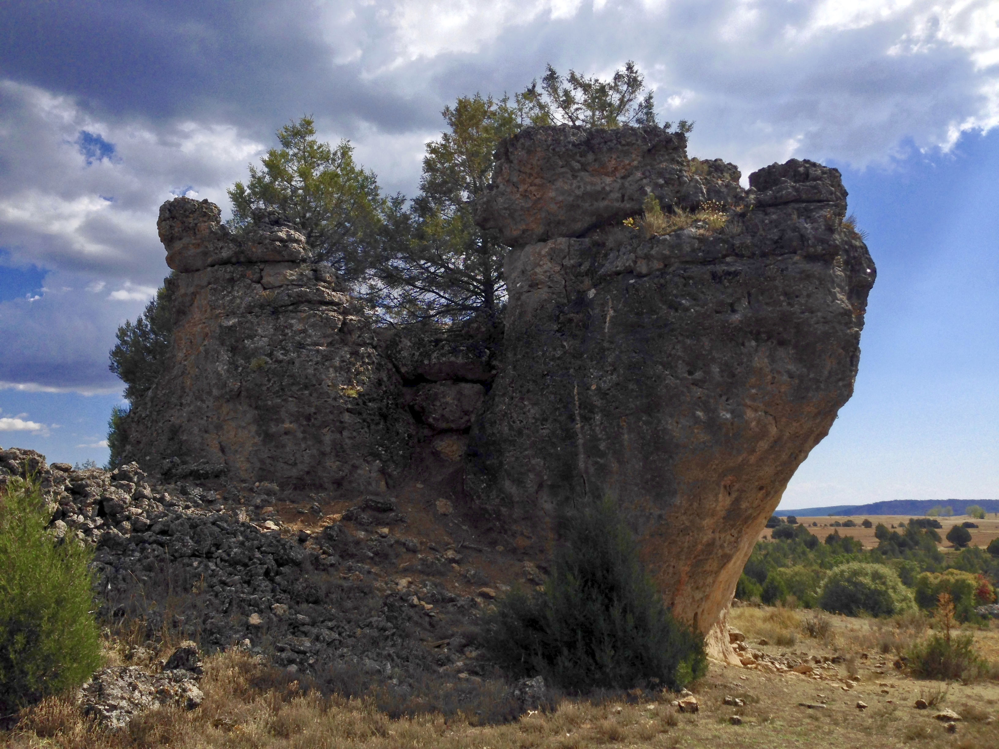 Sierra de Ayllón This is a photography of a Special Area of Conservation in Spain with the ID: ES4160019. Natura2000 entry, EEA entry